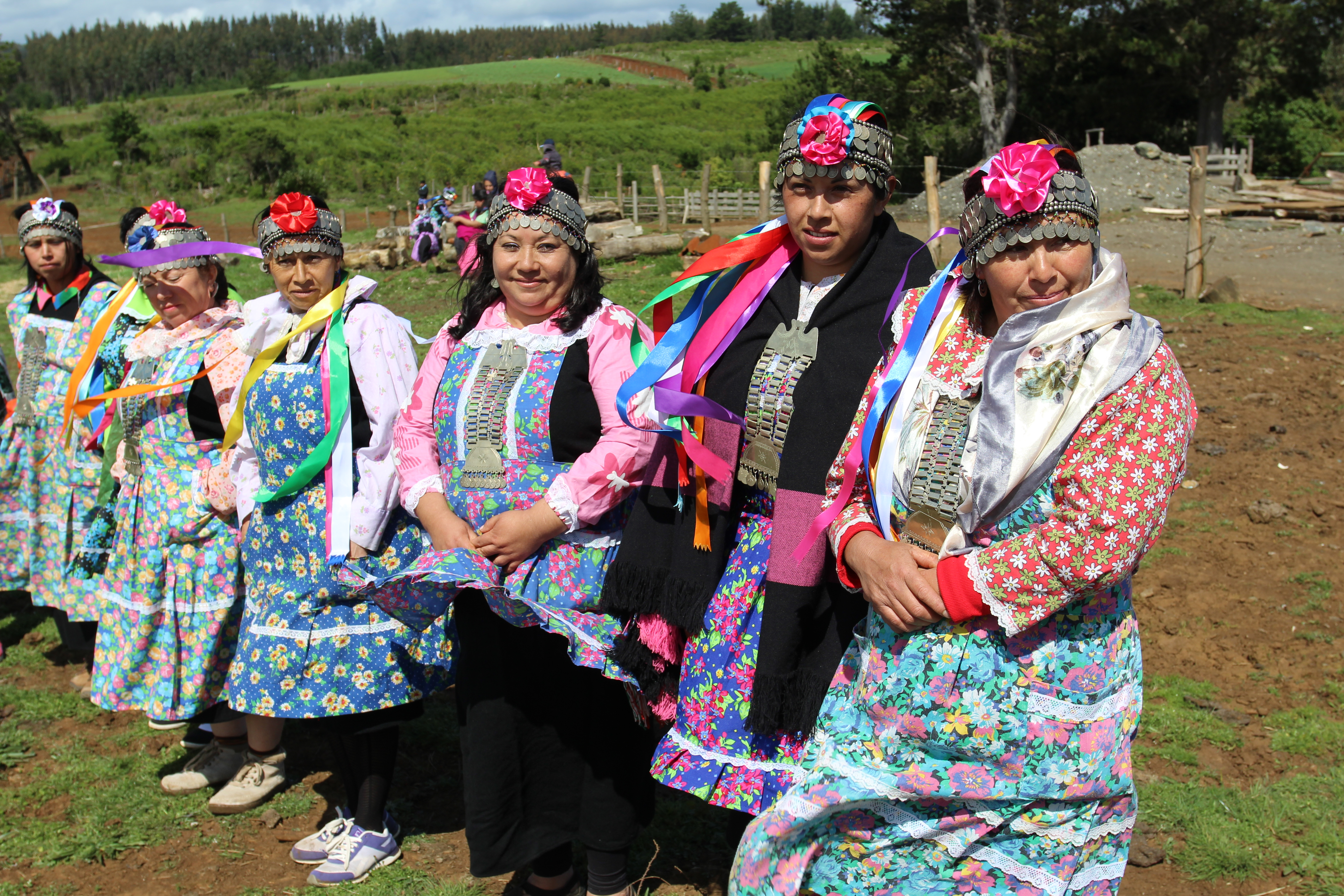 Ministro Osorio entrega terreno a Comunidad Mapuche Lorenzo Quintrileo de Tirúa